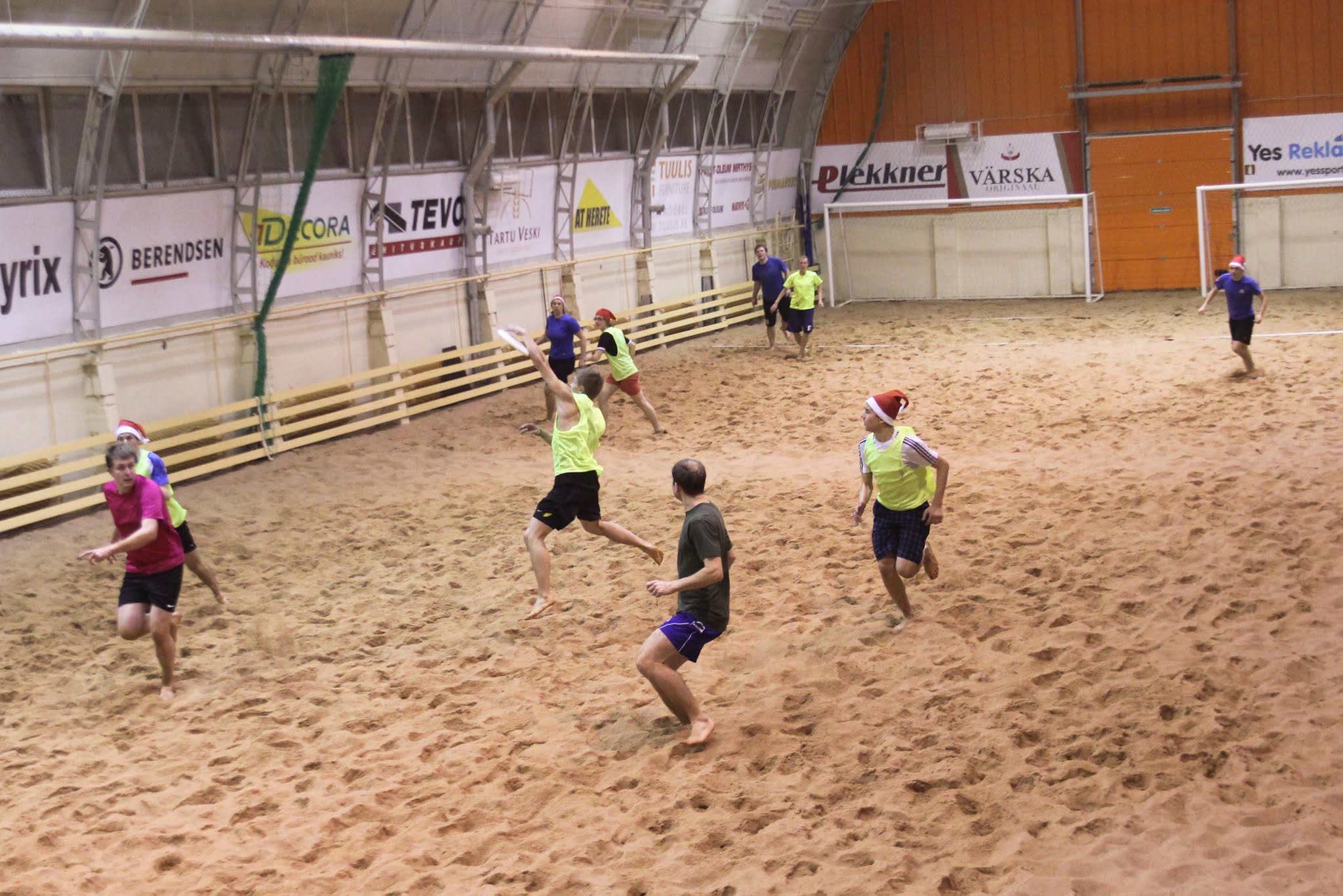 Tartu frisbeeklubi. Jõuluturniir Nõo Rannahallis.